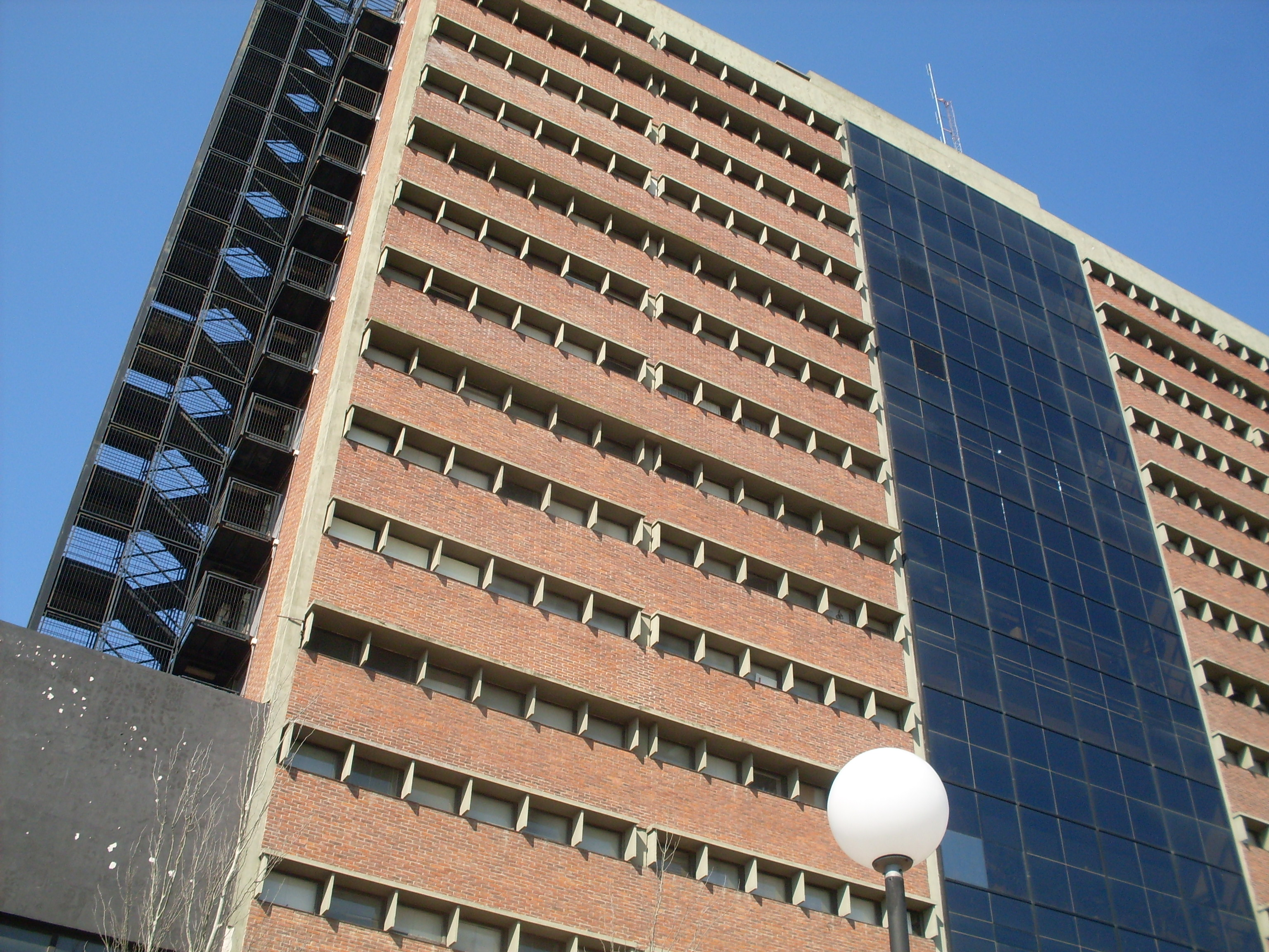 Edificio de la Facultad de Ciencias (Universidad de la República), Malvín Norte.